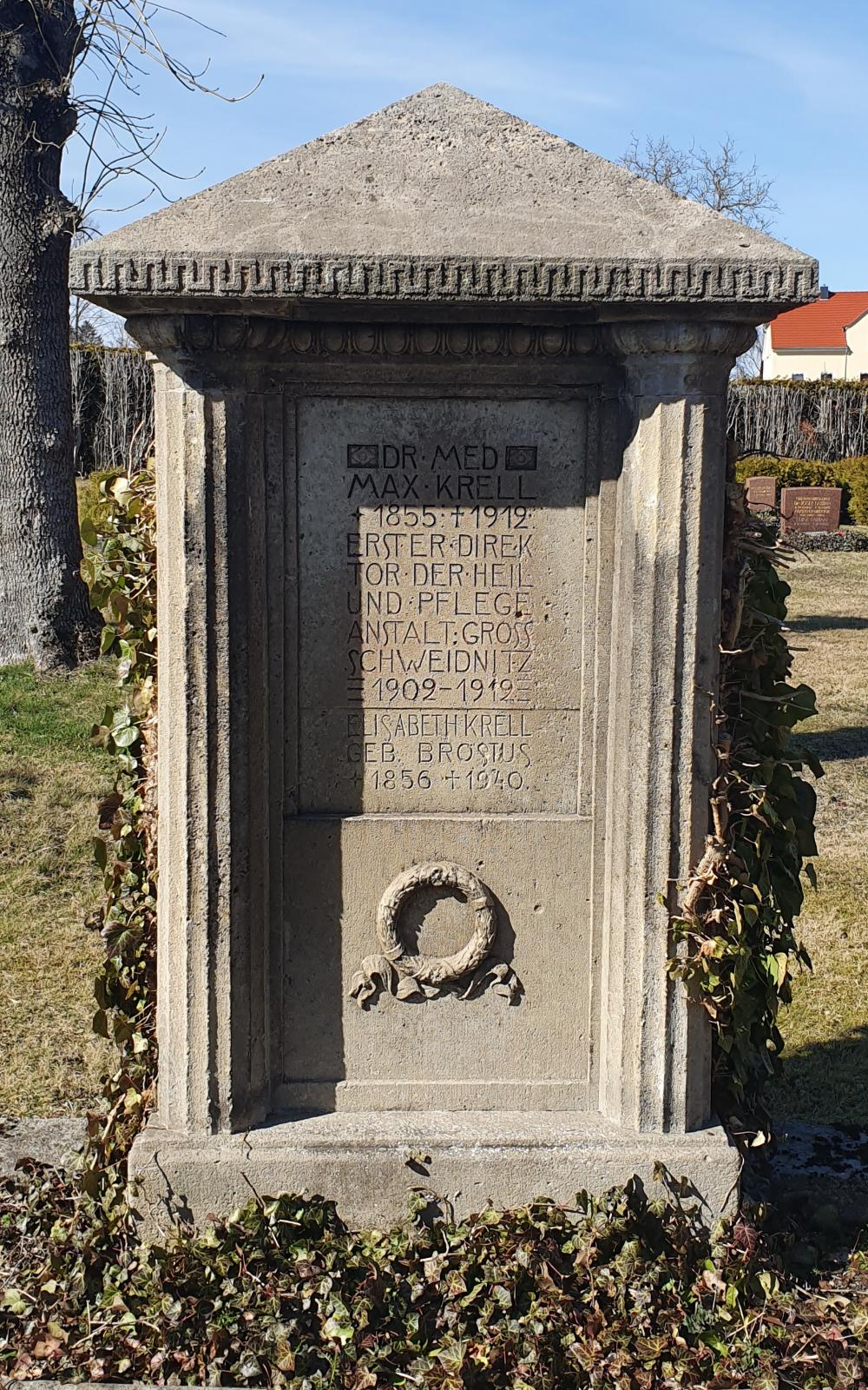 Grab Max Krell, erster Anstaltsleiter Großschweidnitz